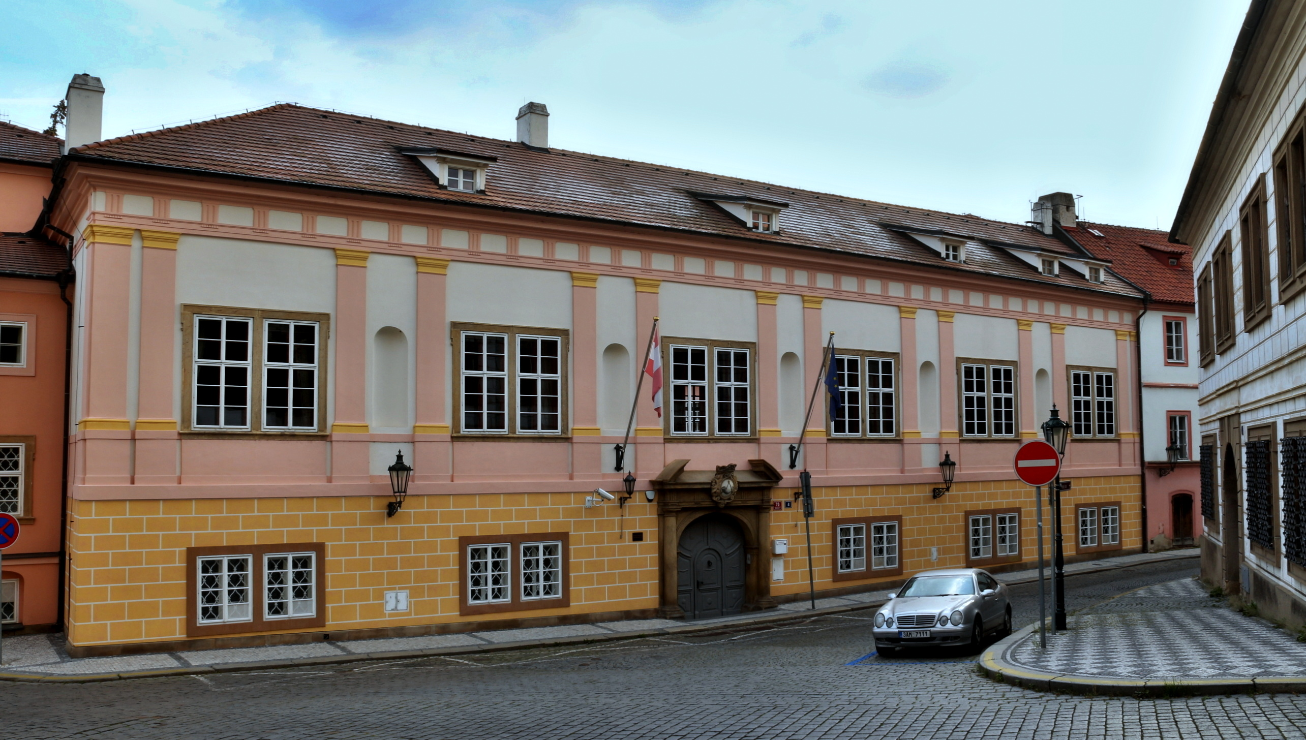 Praha 1-Hradčany palác Hložků ze Žampachu